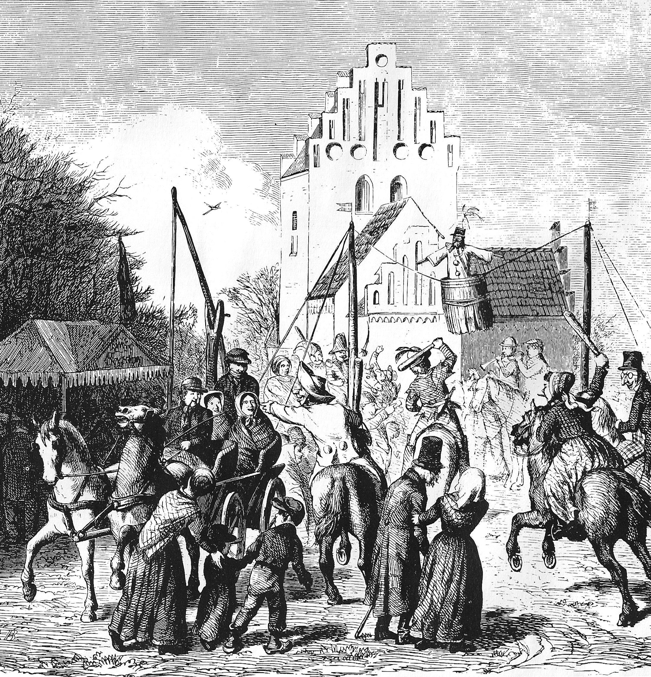 at slå katten af tønden - Fastelavn i Danmark // Xylografi